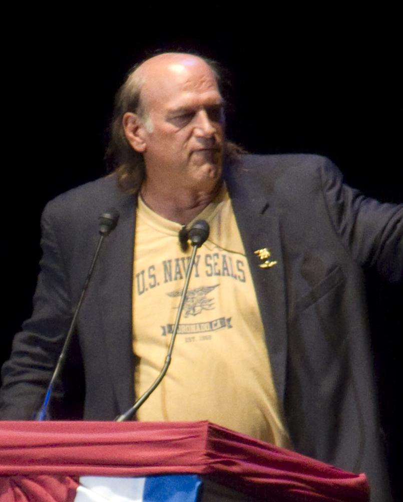 Governor Jesse Ventura